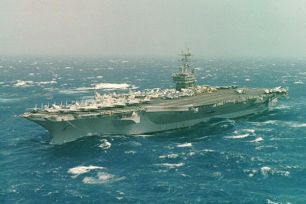 Source : photographie officielle de l'US Navy (Official US Navy Photograph)